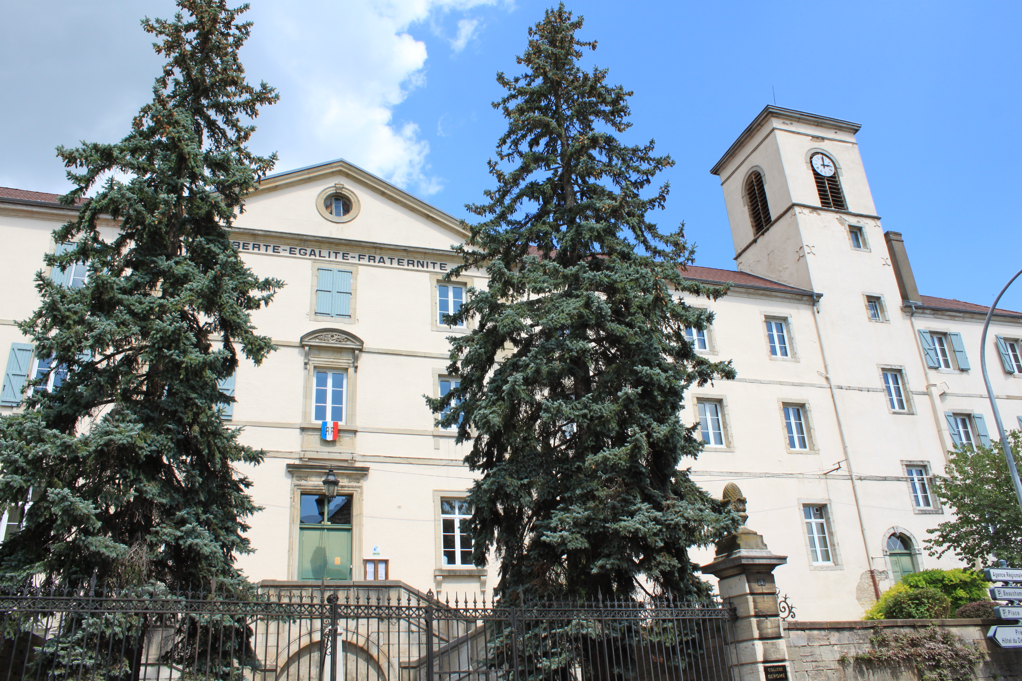 Collège Gérôme, Vesoul, Haute-Saone, Franche-Comté, France